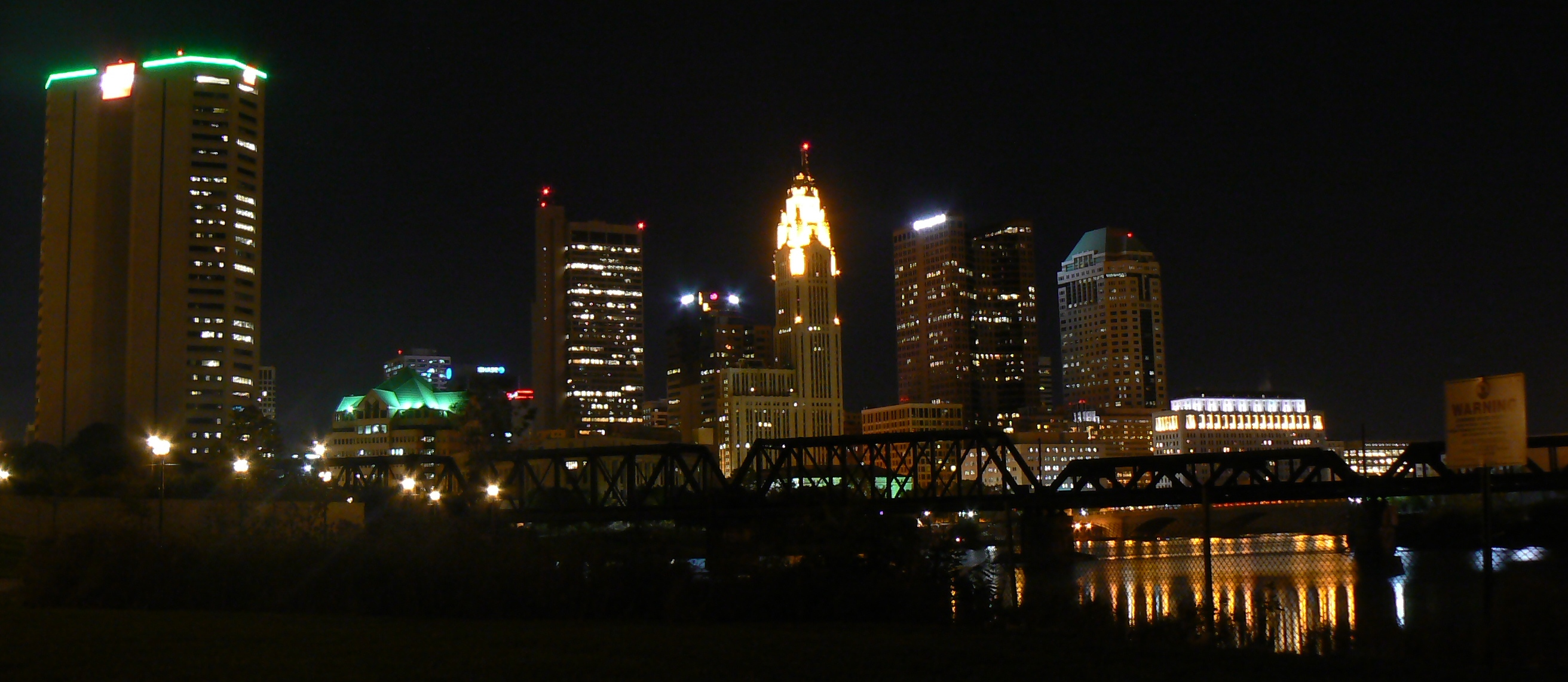 Ночная панорама Колумбуса